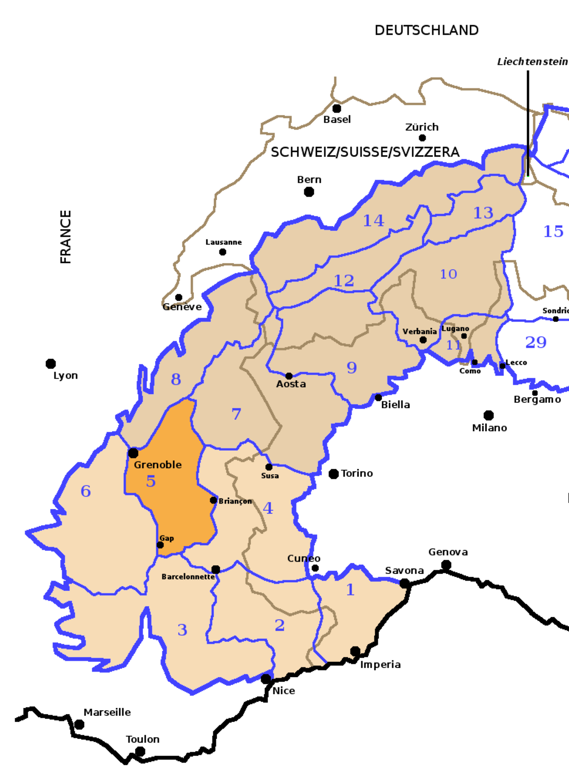 Alpi Occidentali secondo la SOIUSA con evidenziate le Alpi e Prealpi del Delfinato